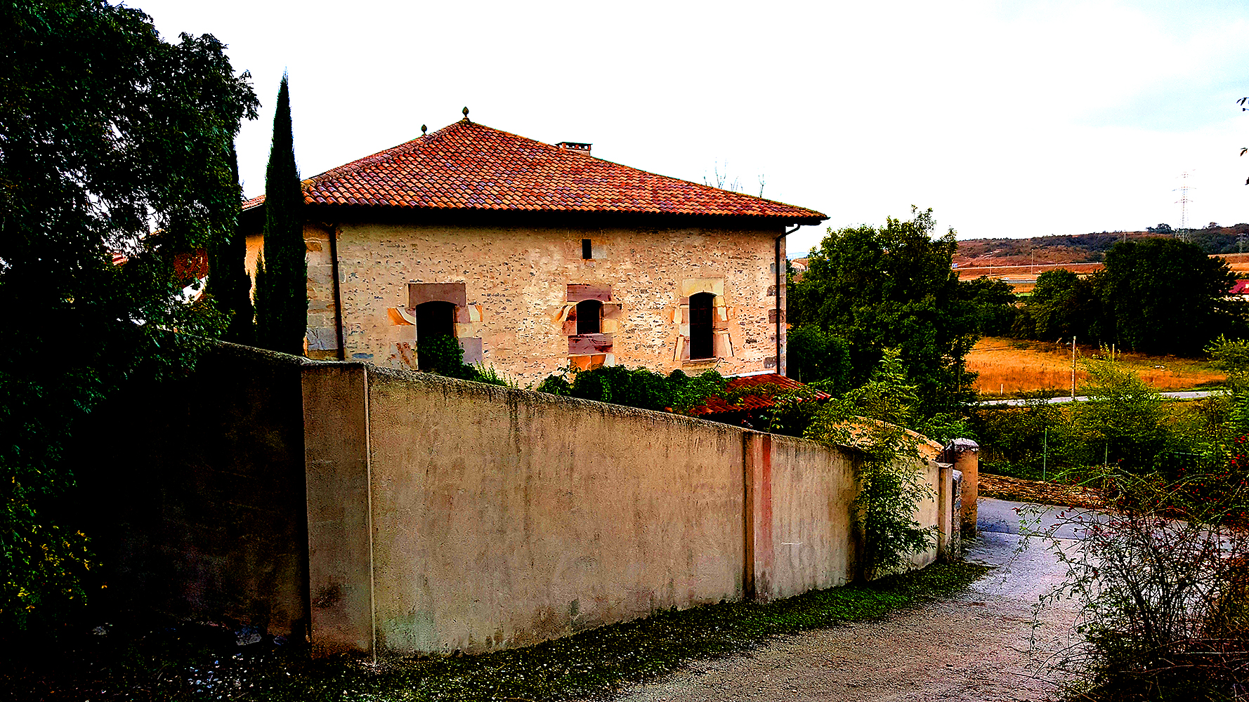 Palacio del siglo XVIII en Luko, Álava